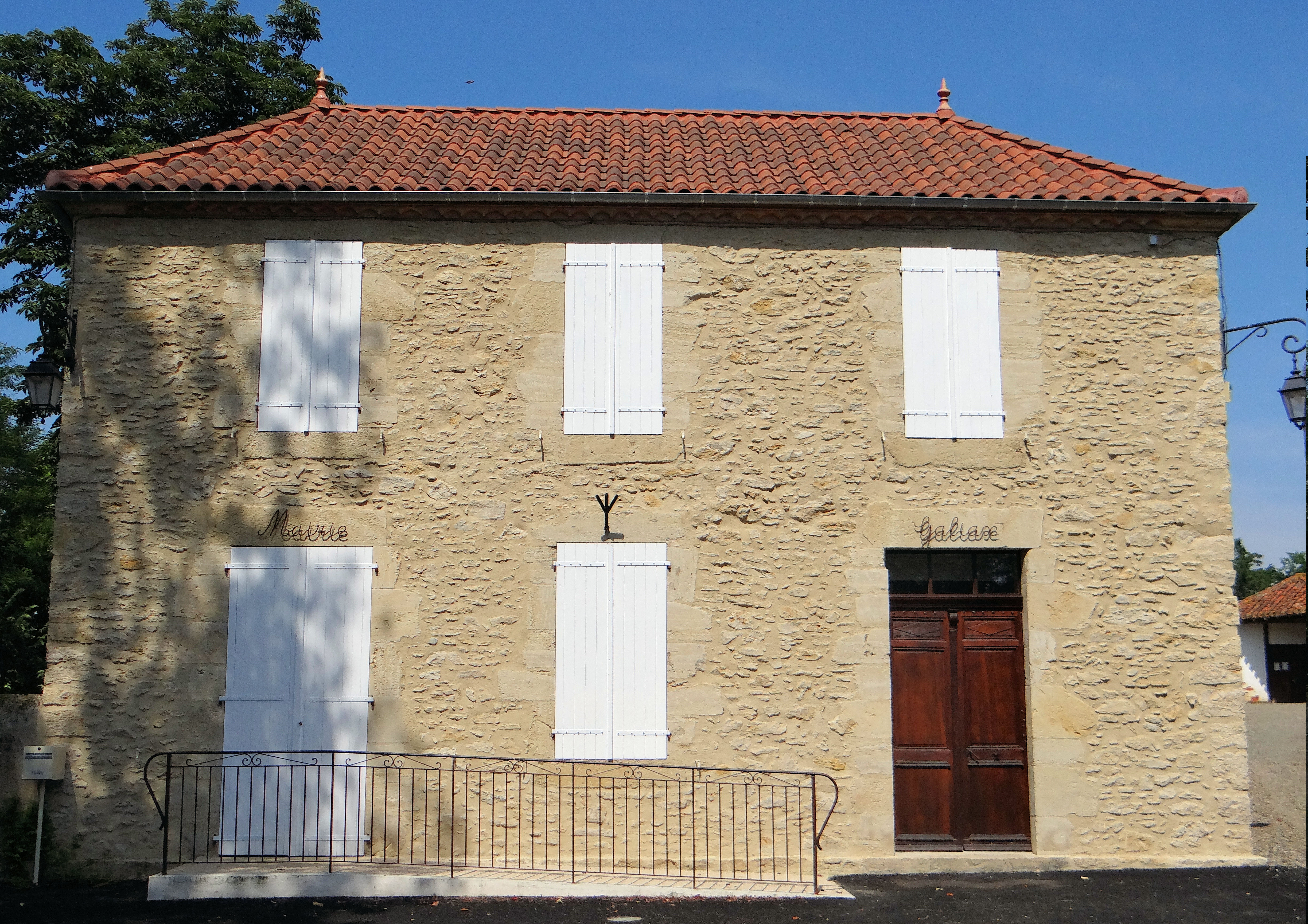 Galiax - Mairie